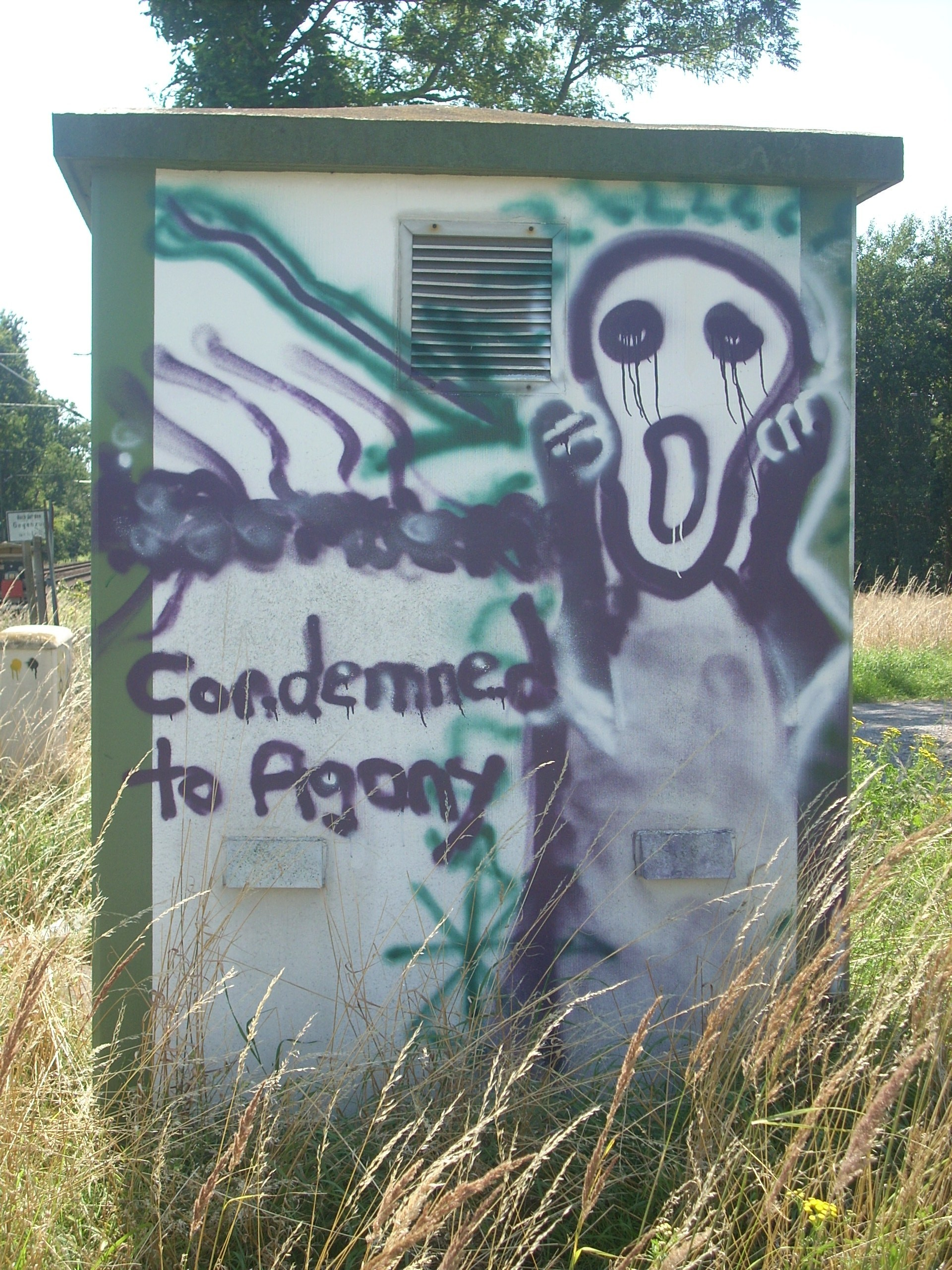 Graffito Condemned to Agony nach Edvard Munch Der Schrei; Bahnstrecke Sehnde-Lehrte, Transformatorenhäuschen